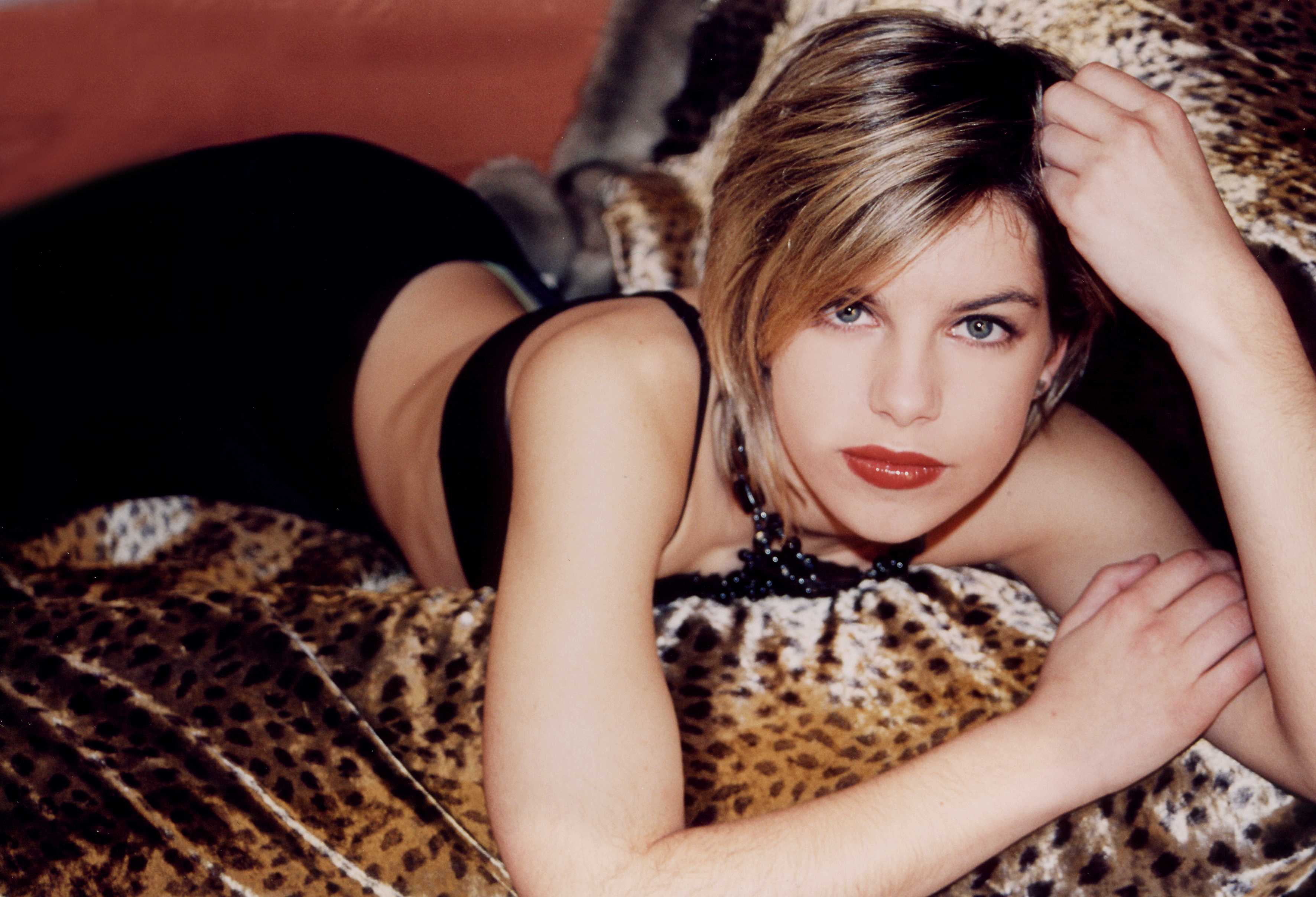 Mariona Ribas